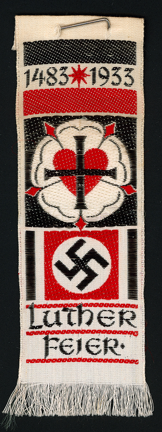 Lutherfeier 1933, Ansteckband, Bestand: AEKR Düsseldorf 8SL 046 (Bildarchiv), 4_0018